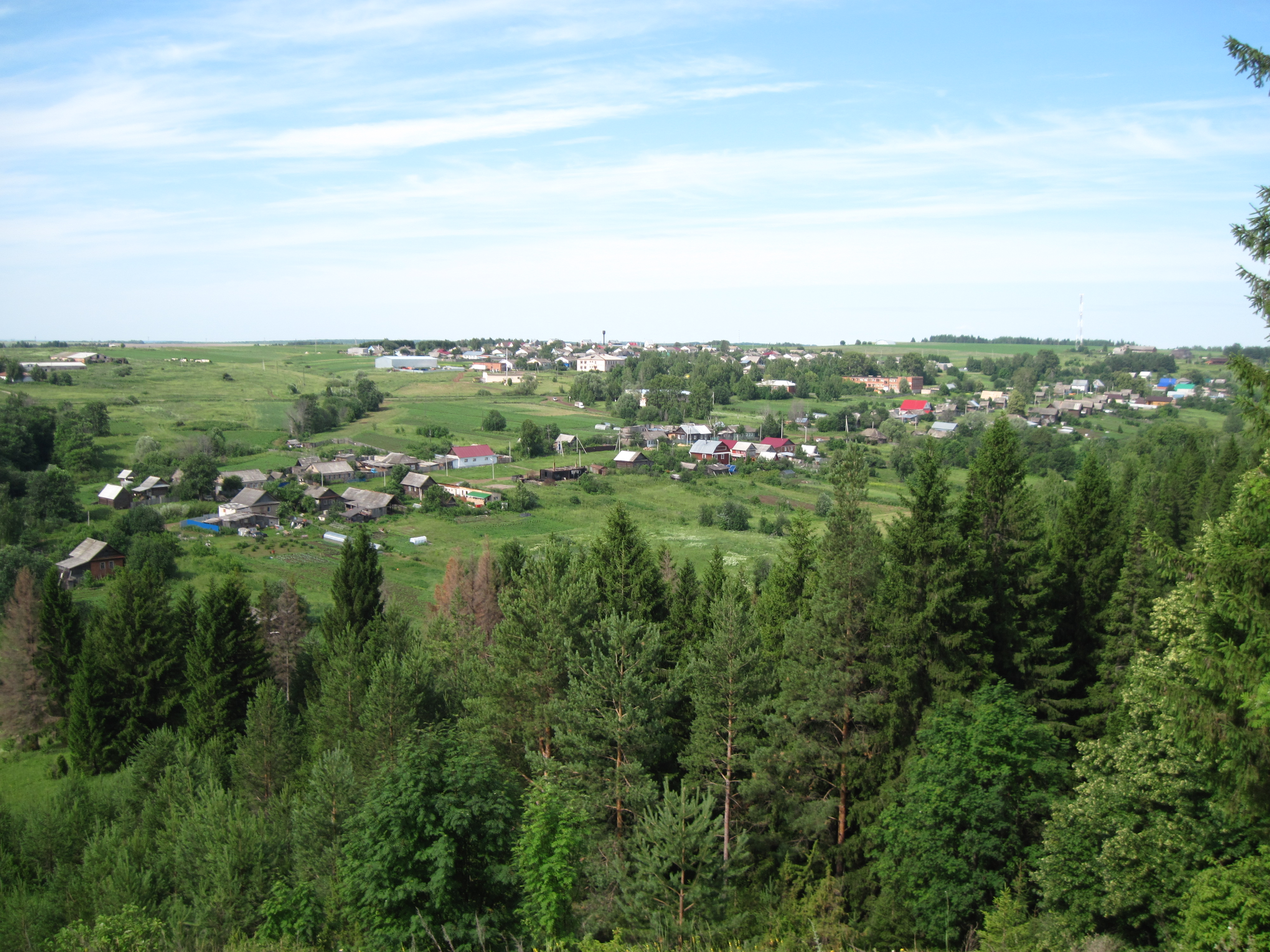 Воткинский район,Удмуртской Республики